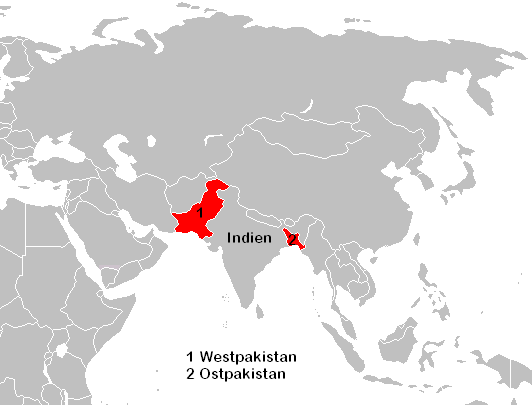 West- und Ostpakistan 1971